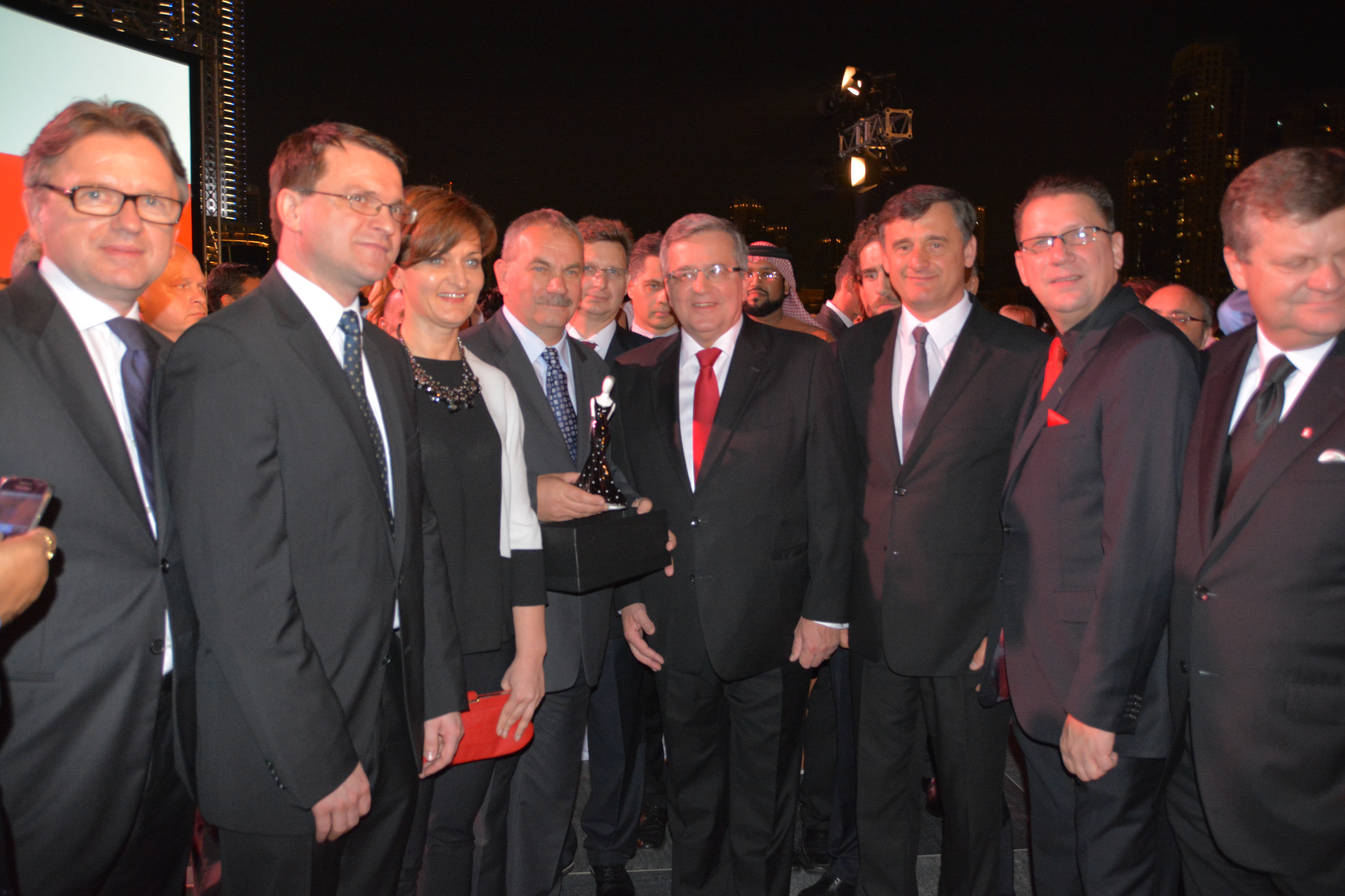 Wyjazd przedsiębiorców do Zatoki Perskiej z Prezydentem RP